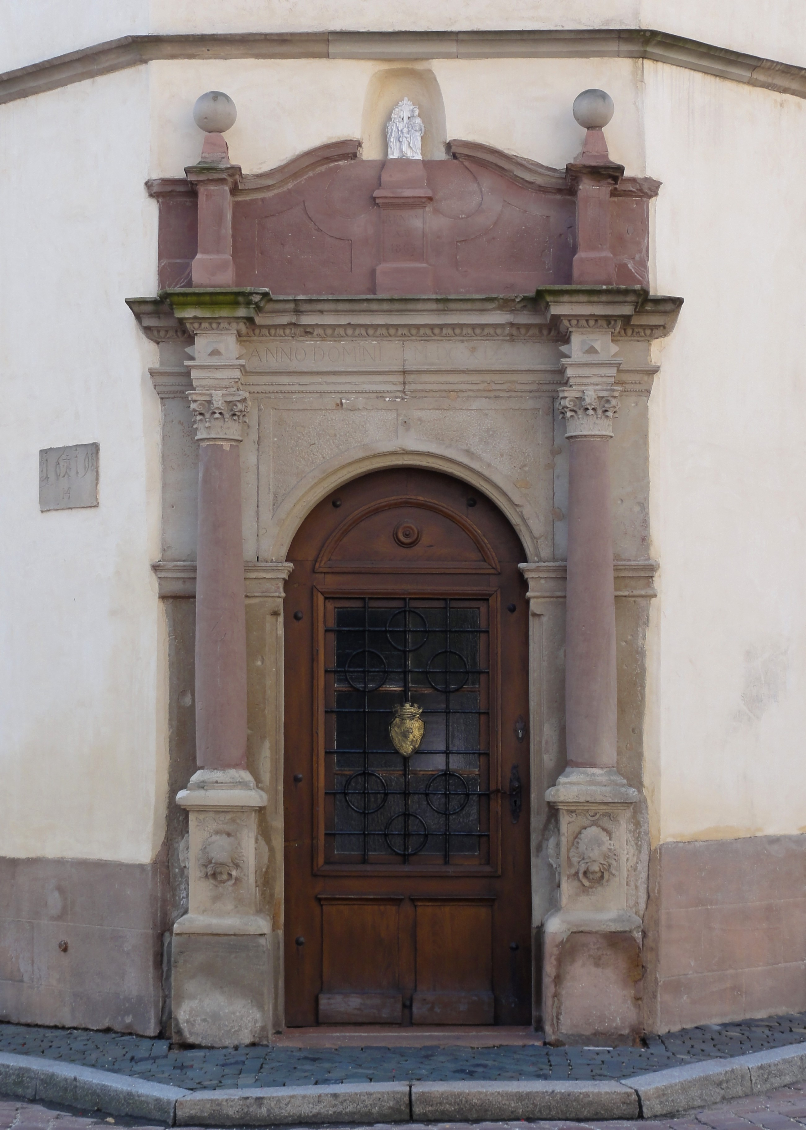 Alsace, Bas-Rhin, Benfeld, Hôtel de Ville (1619), place de la Mairie (PA00084605, IA00023505).